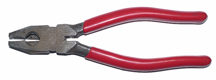 plier